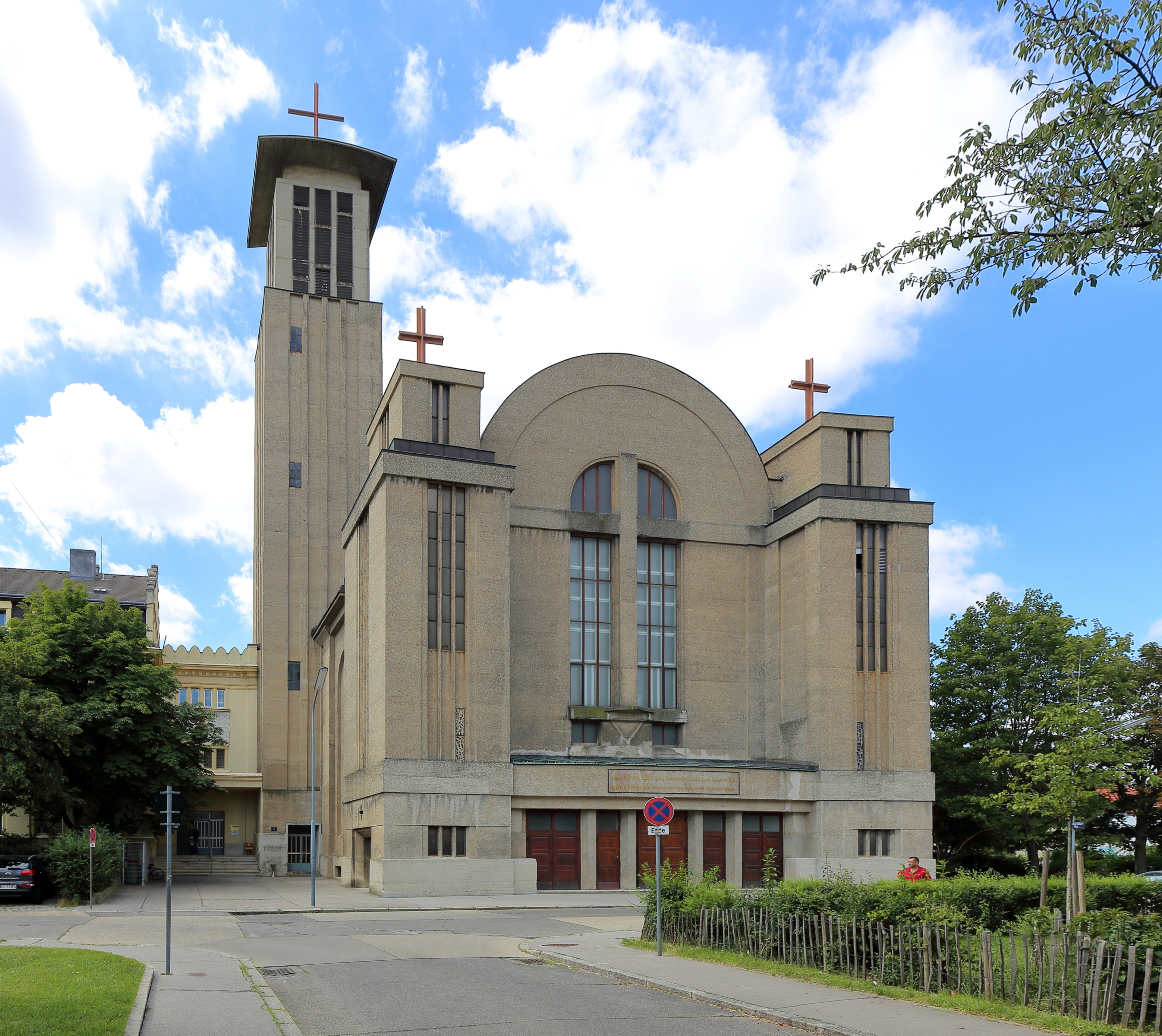 Nordansicht bzw. Hauptfassade der ehemaligen Kloster- und Pfarrkirche Maria vom Berge Karmel (Karmeliterkirche) am Stefan-Fadinger-Platz 1 im 10. Wiener Gemeindebezirk Favoriten.Die Kirche wurde ab 1928 anstelle einer abgebrannten Notkirche nach Plänen von Hans Prutscher errichtet und erst 1942 vollendet. Sie war nach Plecniks wegweisender Pfarrkirche auf der Schmelz (1911) die zweite „Betonkirche“ in Wien. Am 21. Februar 1945 wurde sie durch Fliegerbomben weitgehend zerstört (mit 140 Todesopfern). Nach Kriegsende erfolgte der Wiederaufbau, so dass nach der Wiederherstellung von Kuppel und Dach (1950) die Unterkirche 1951 geweiht werden konnte. Die ab 1957 begonnene Wiederherstellung der Oberkirche und der Bau des Turmes erfolgte stark verändert nach Plänen von Helene Koller-Buchwieser und mit der Glockenweihe am 15.Mai 1966 wurde der Wiederaufbau abgeschlossen. Mit Jahresende 2014 erfolgte die Übergabe des Gotteshauses mit Klostergebäude und Garten mangels Gläubiger, Priestermangel und Kostenreduktion, etc. an die aufstrebende syrisch-orthodoxe Metropolie.